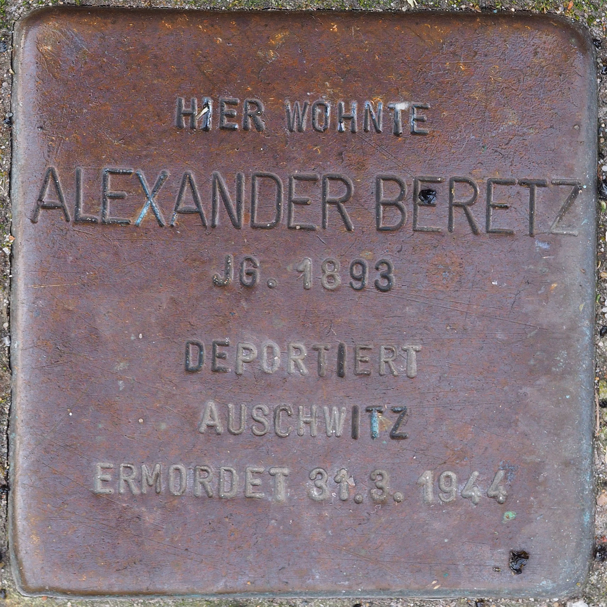 Stolpersteine MG: Berentz, Alexander